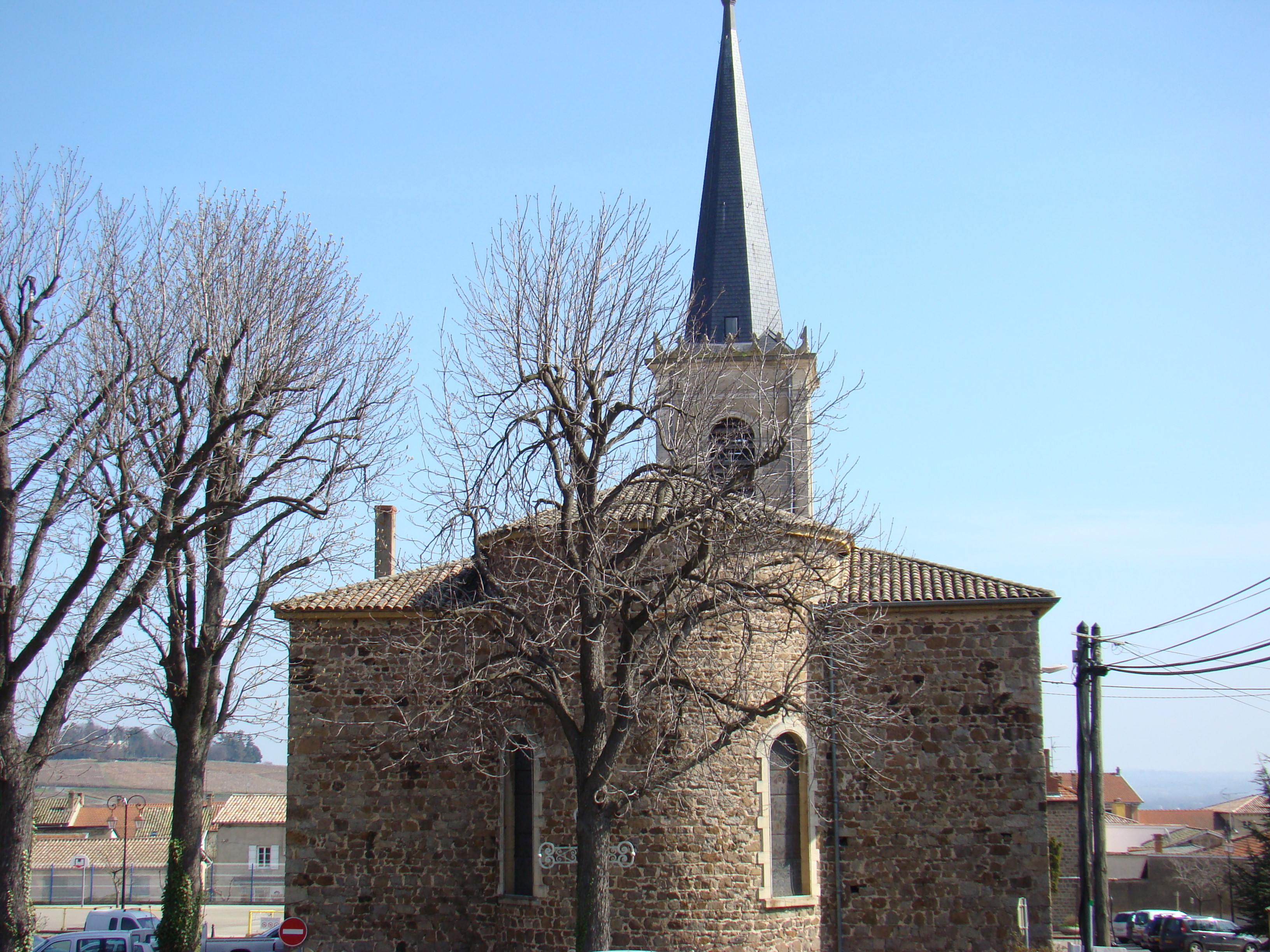 Eglise de Saint Etienne des Oullières